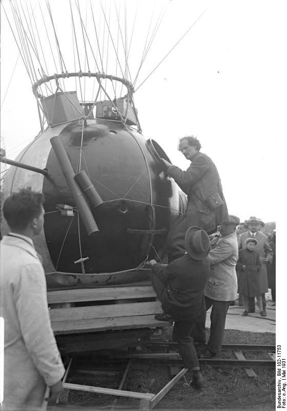 Prof. Piccard wieder startbereit zu seinem Stratosphären-Flug in 16.000 m Höhe in Augsburg! Prof. Piccard steigt in die Kugelgondel zu seinem Forschungsflug.